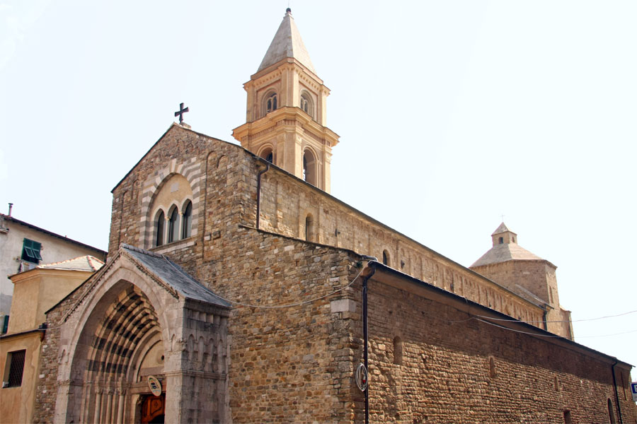 Cattedrale di Santa Maria Assunta, Ventimiglia (IM)